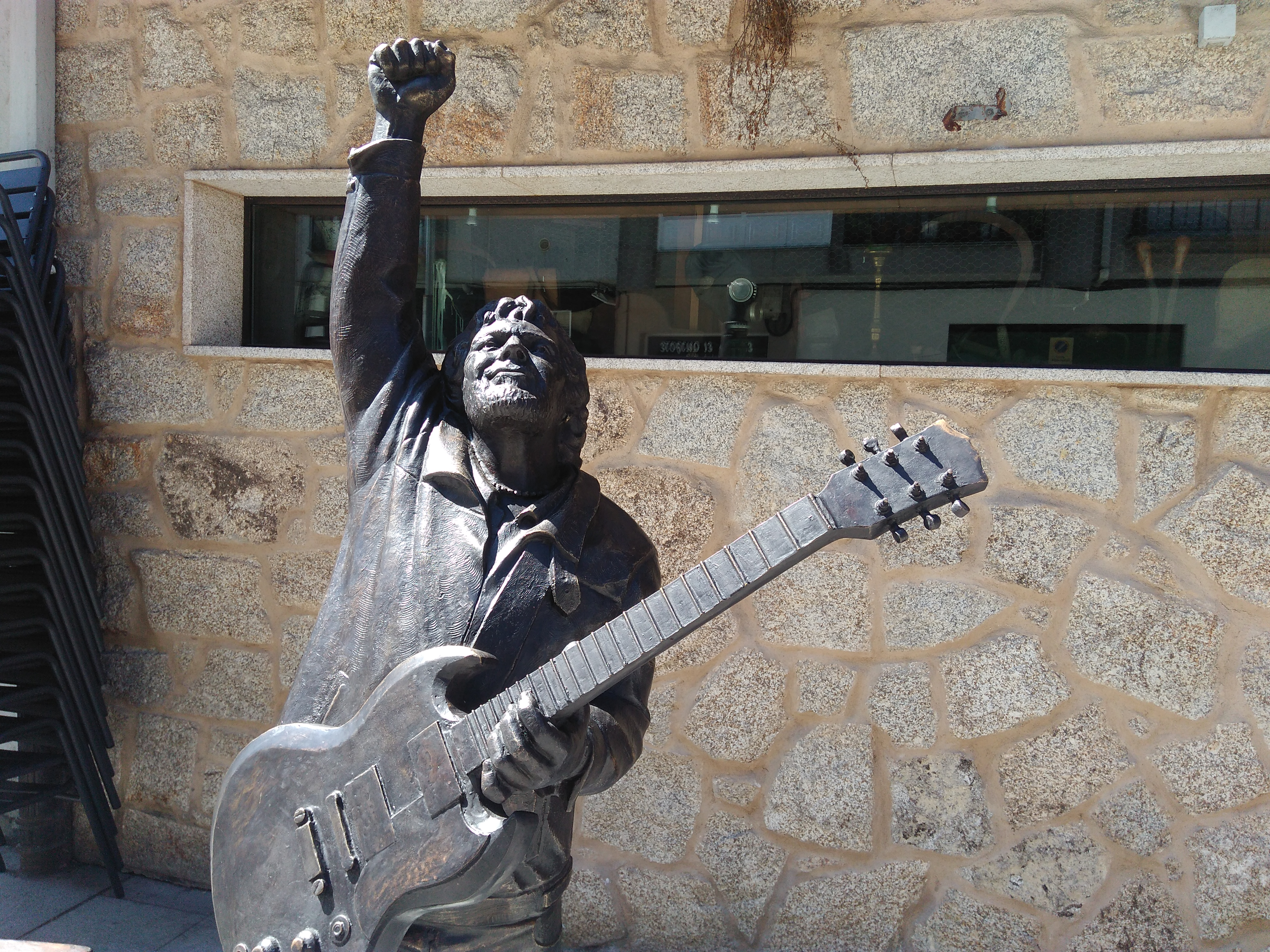 Estatua de Narf na Pousada das Ánimas en Boiro (A Coruña)